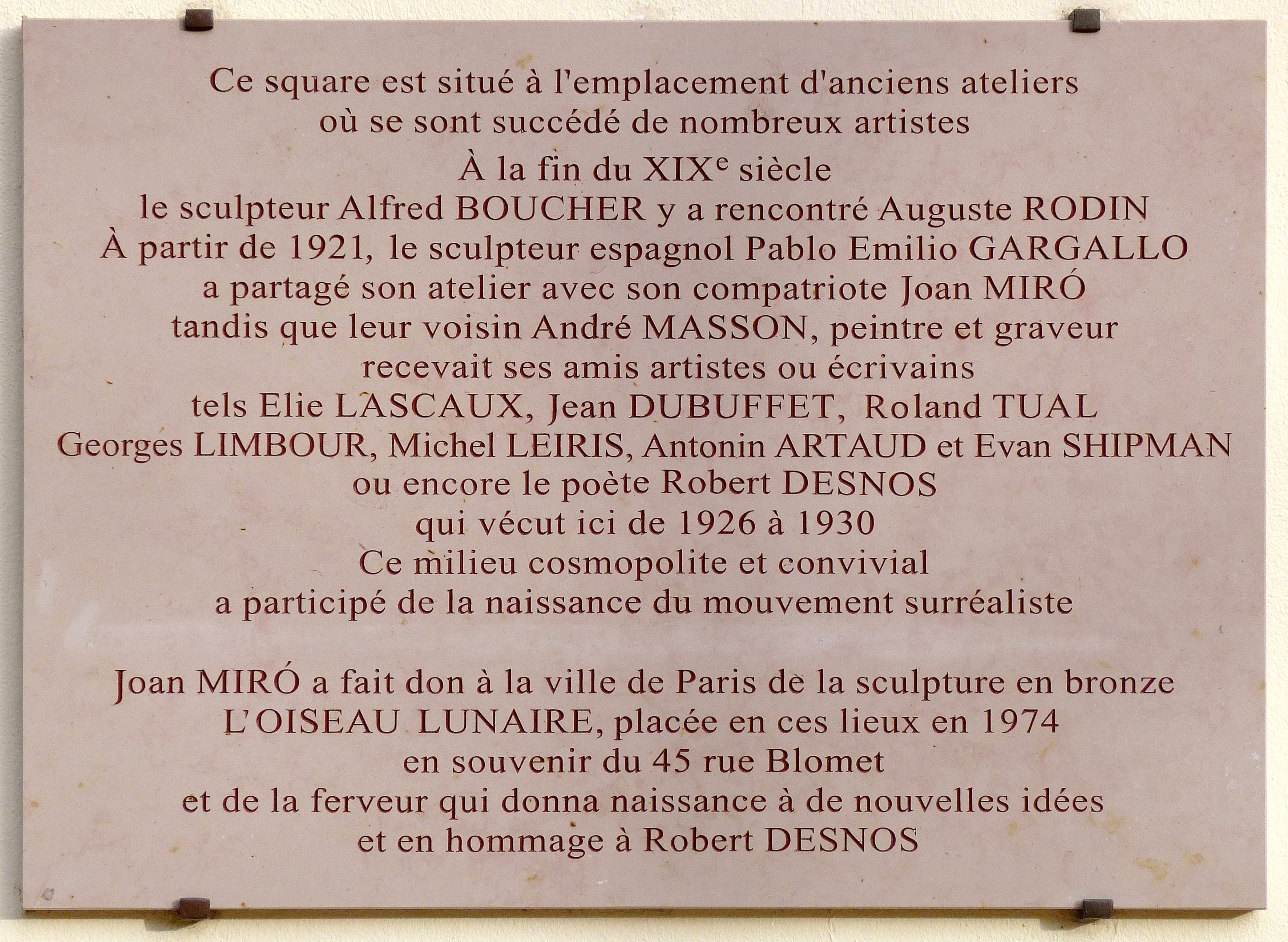 Plaque apposée à l'intérieur du square de l'Oiseau lunaire, Paris (15e arrond.).